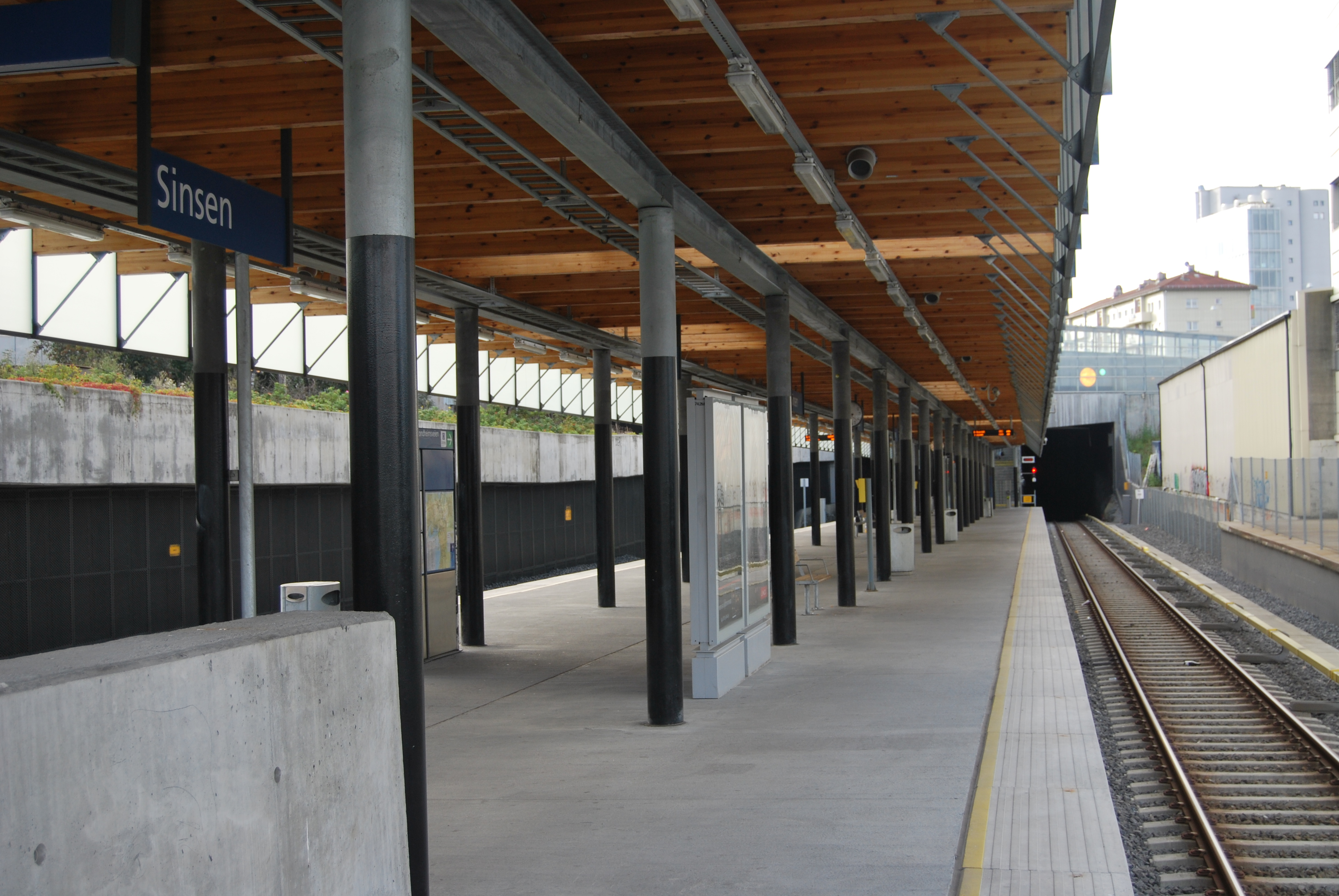 Stacja; Sinsen stasjon (Oslo) 2009 r.